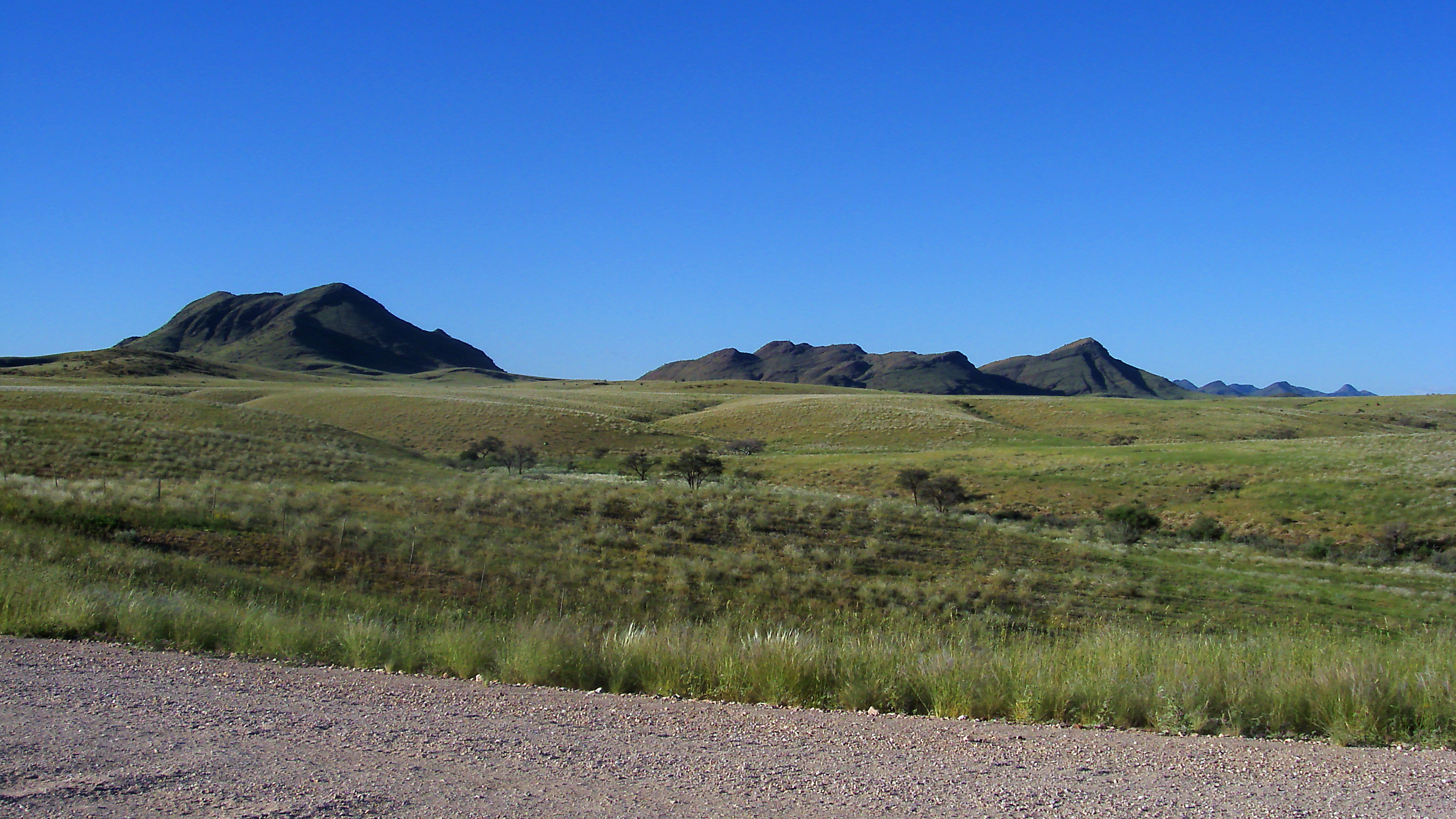 Khomas-Hochland, Namibia, auf der C26 in der Nähe des Gamsberg-Passes